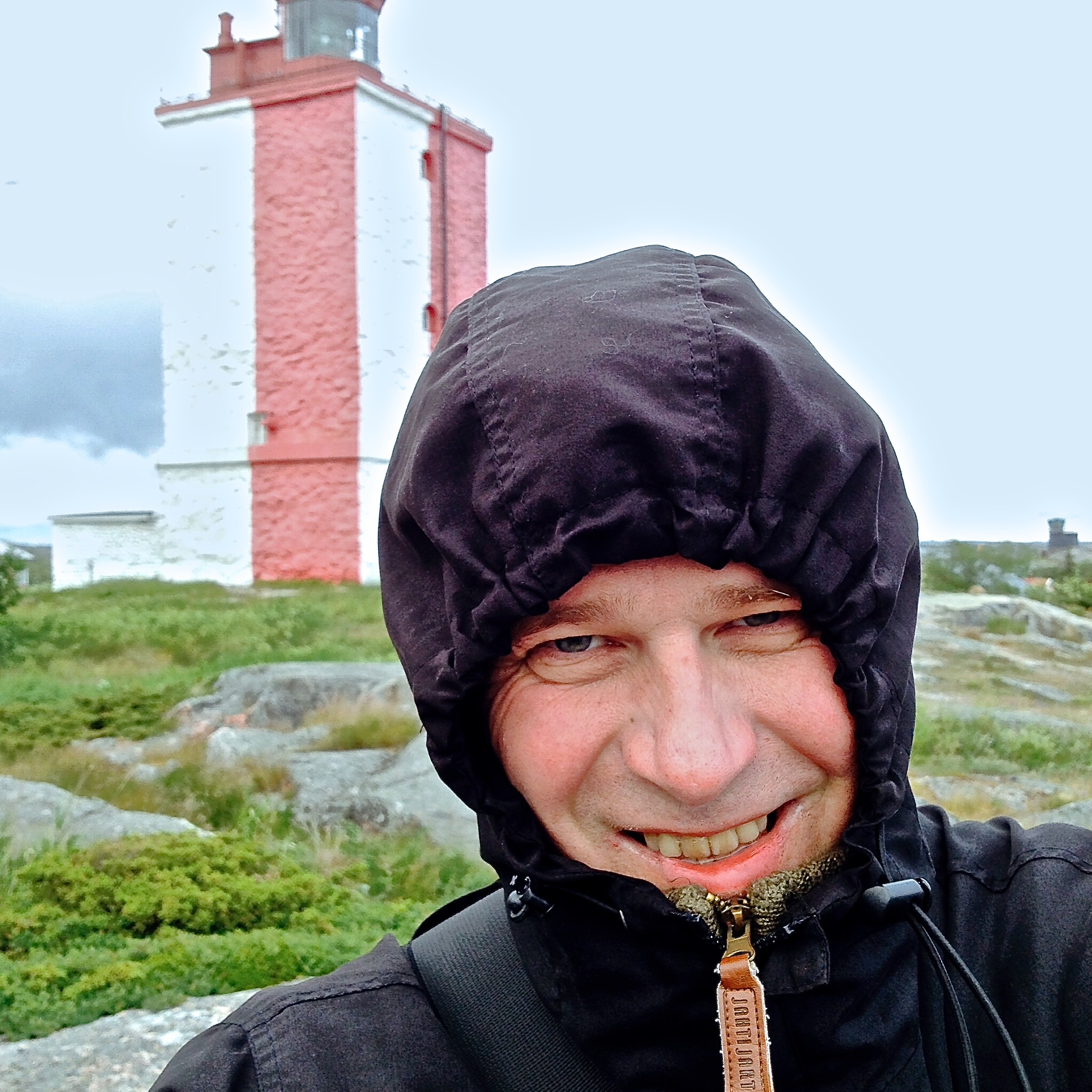 Mikon kuva kesältä 2014